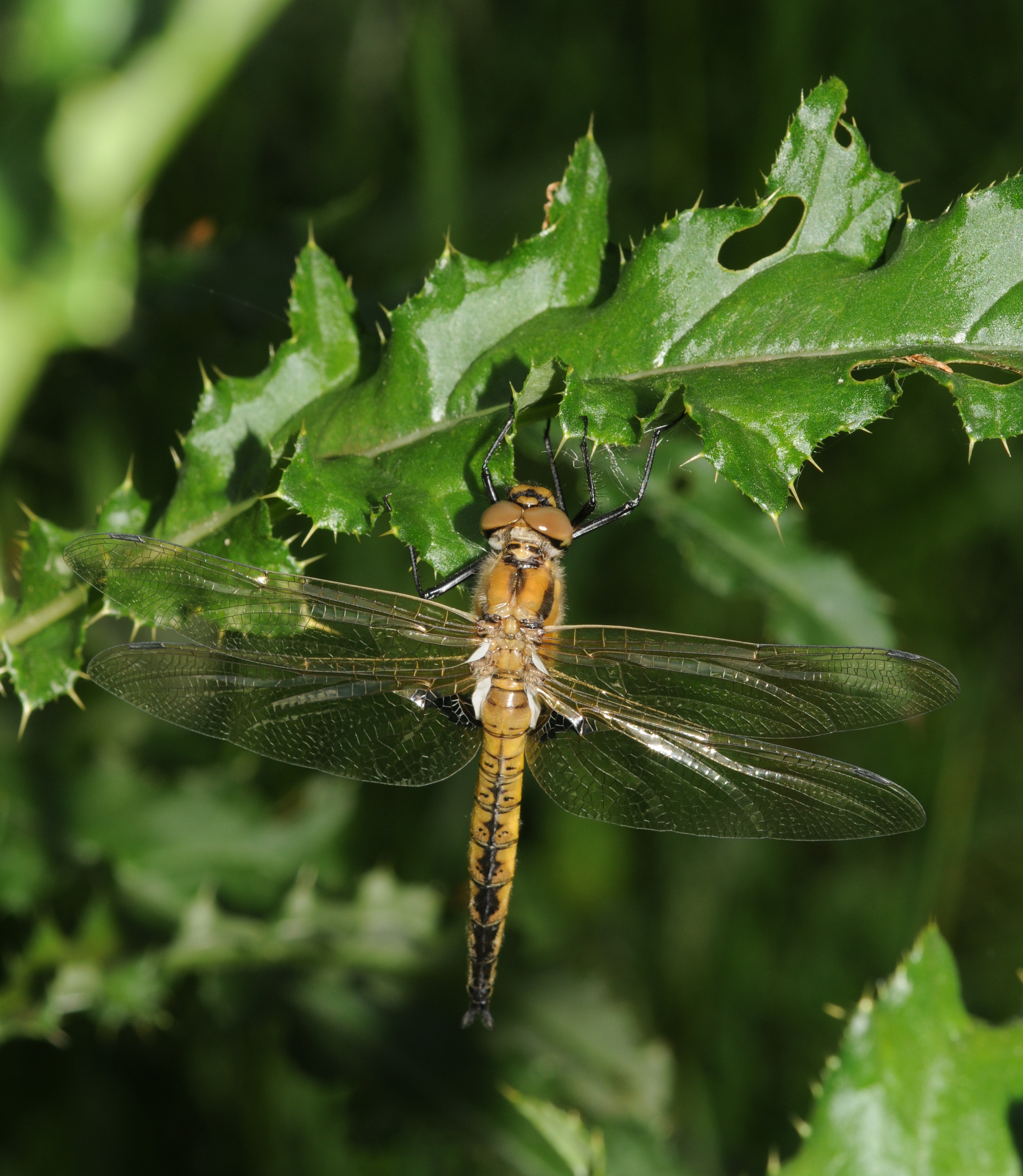 Cordulie à deux taches.